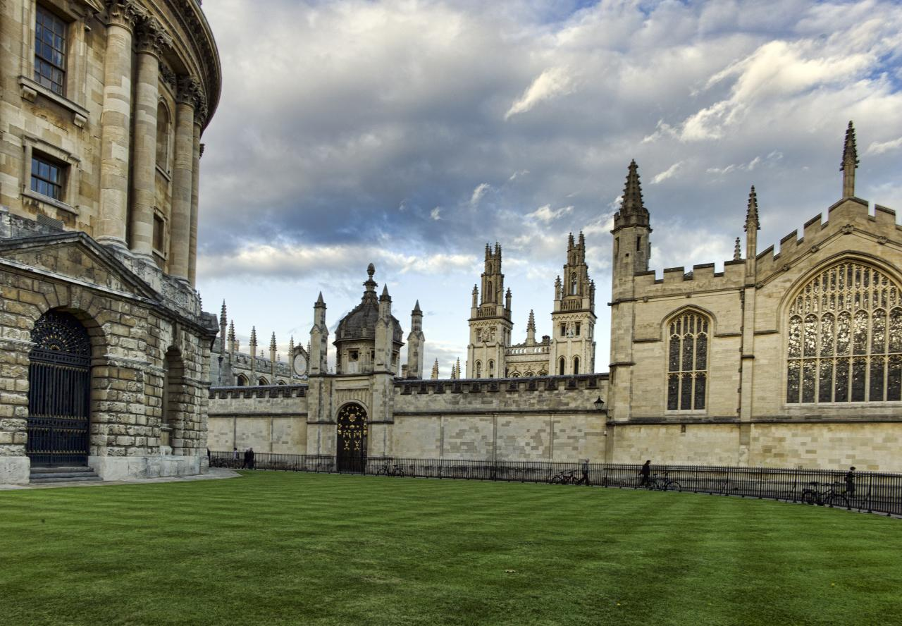 merry olde england